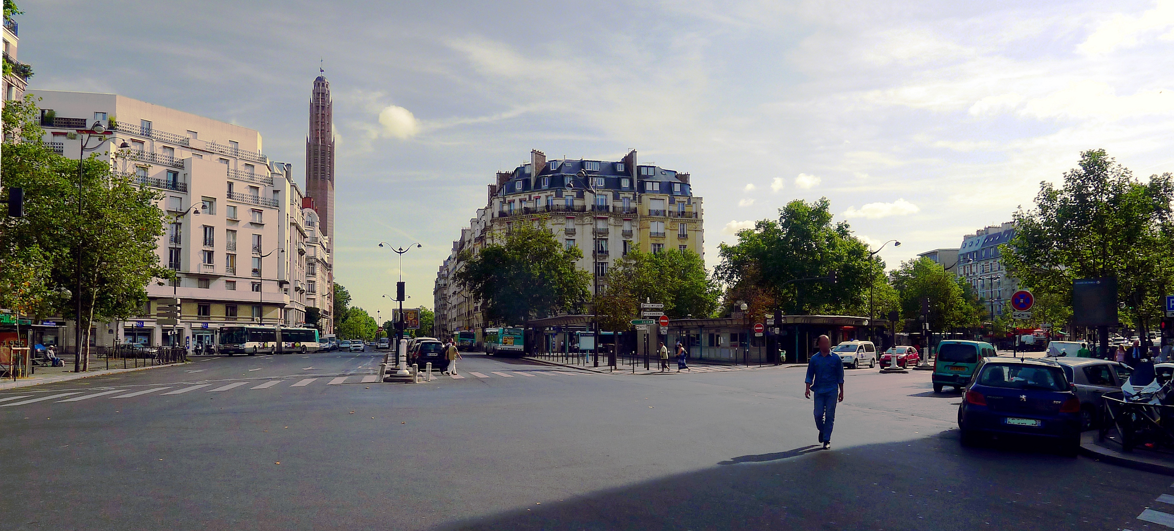 Porte de Champerret - Paris XVII